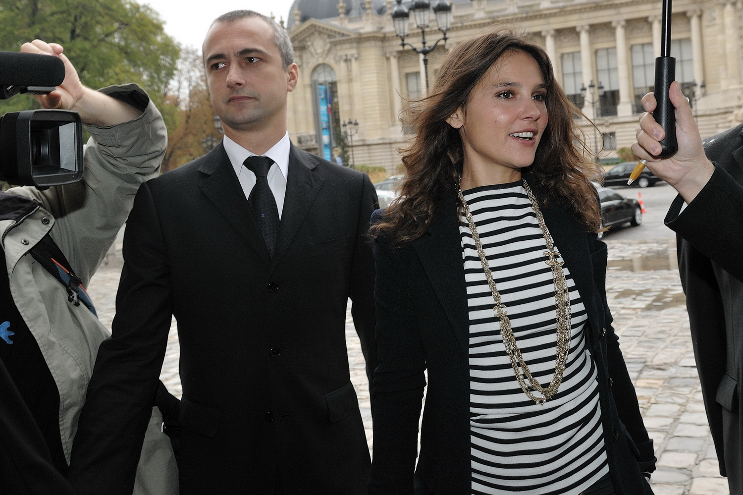 Défilé Channel printemps/été 2010 prêt-à-porter au Grand Palais (Avenue du Général Eisenhower - Paris 75008) Karl Lagerfeld a fait fort, en transformant le Grand Palais en étable géante. Des People en pagaille emmenés par Lily Allen (ambassadrice de la ligne Coco Cocoon) suivi de Bernadette Chirac, Claudia Schiffer, Rihanna, Virginie Ledoyen, Anna Wintour, Sean Lennon et Charlotte Kemp Muhl, Marie-Josée Croze, Prince accompagné de sa fiancée, et Irina Lazareanu, l'ex de Pete Doherty.